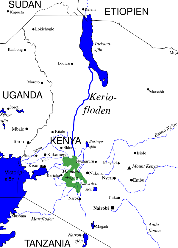 Kerio-floden i Kenya